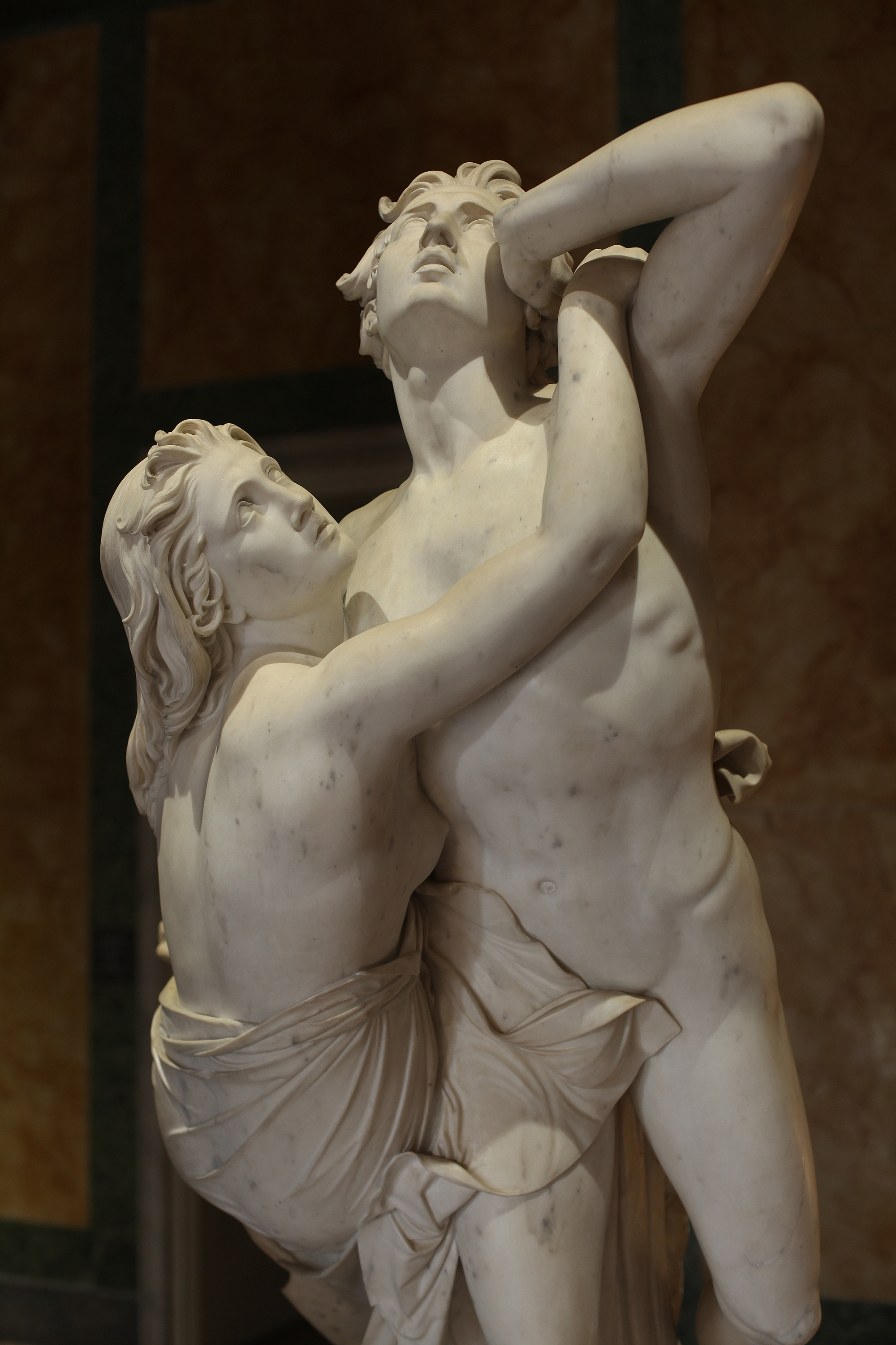 Alessandro Puttinati (1801-1872) Paolo e Francesca (1863), dettaglio; Galleria d'Arte Moderna di Milano; legato Francesco Ponti, 1895